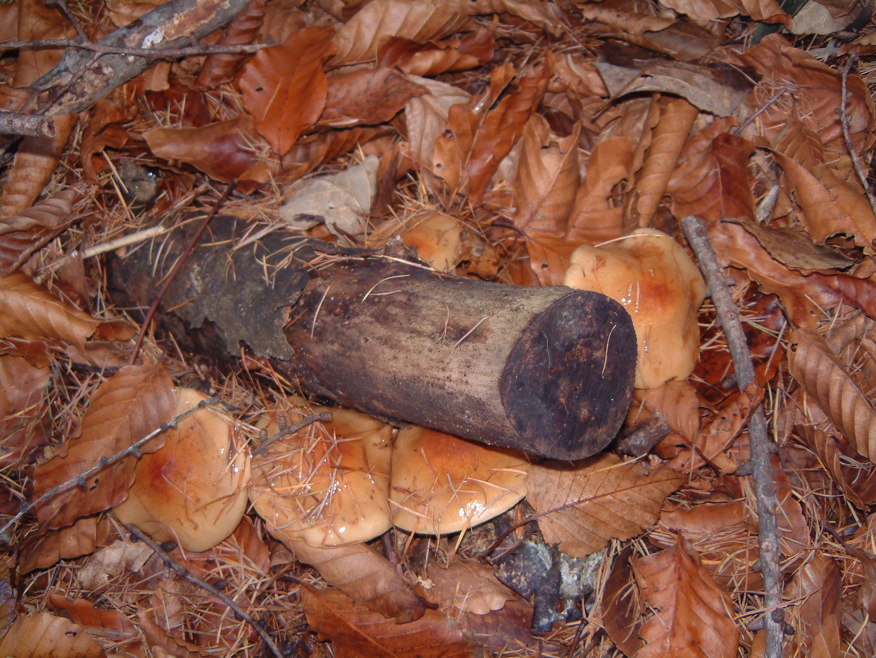 ナメコ、群馬県武尊山にて撮影